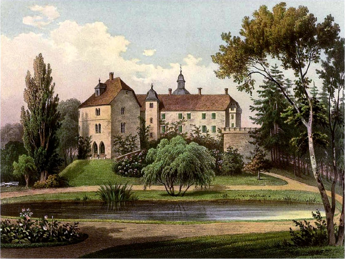 Schloss Altengottern, Kreis Langensalza, Provinz Sachsen